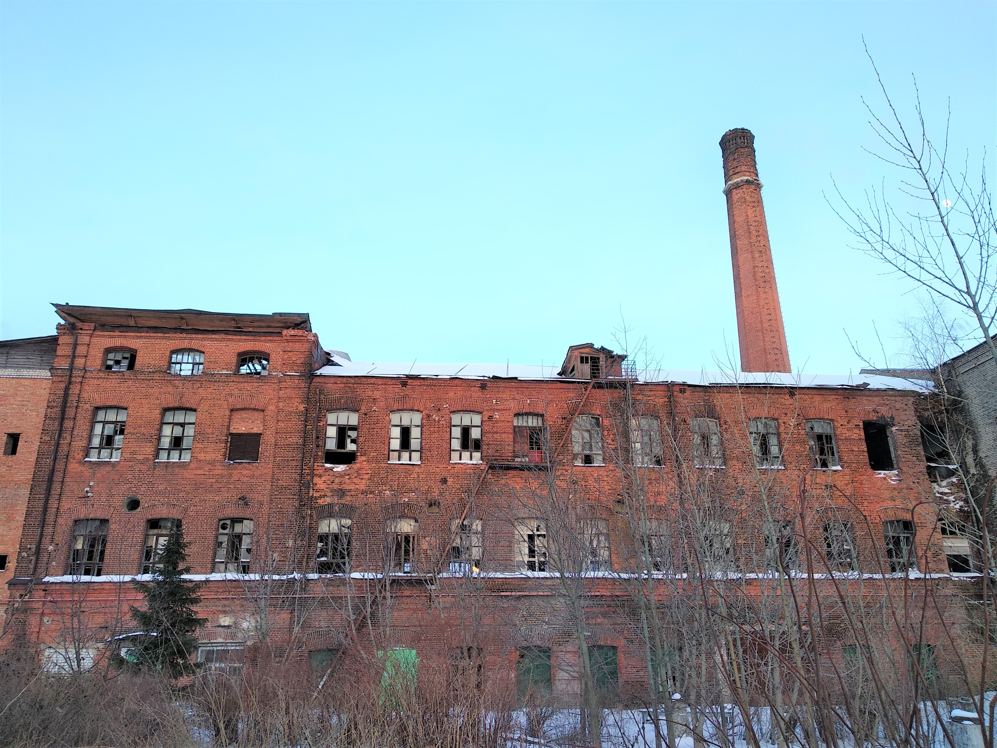 Фабрика Рольма (г. Ростов Ярославской обл.) в 2020 году. Объект культурного наследия России № 7631579000